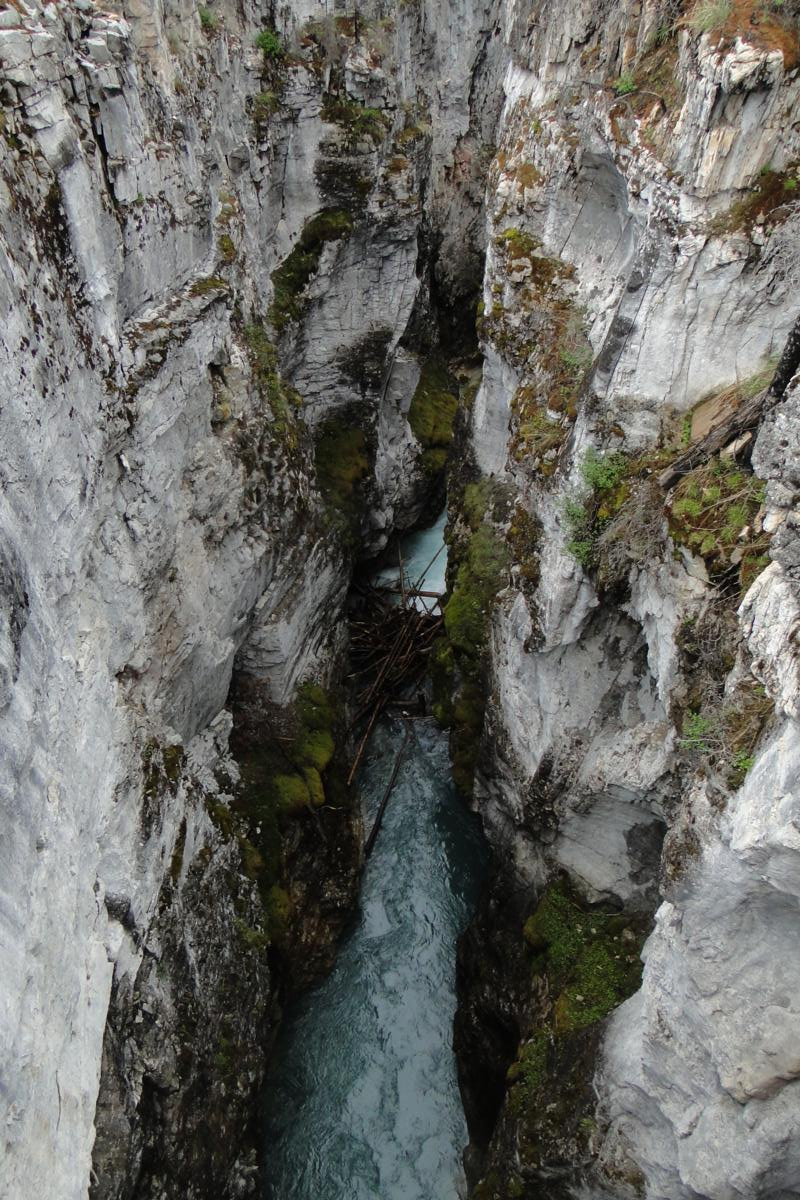 Глубокий и узкий каньон. Кутуней